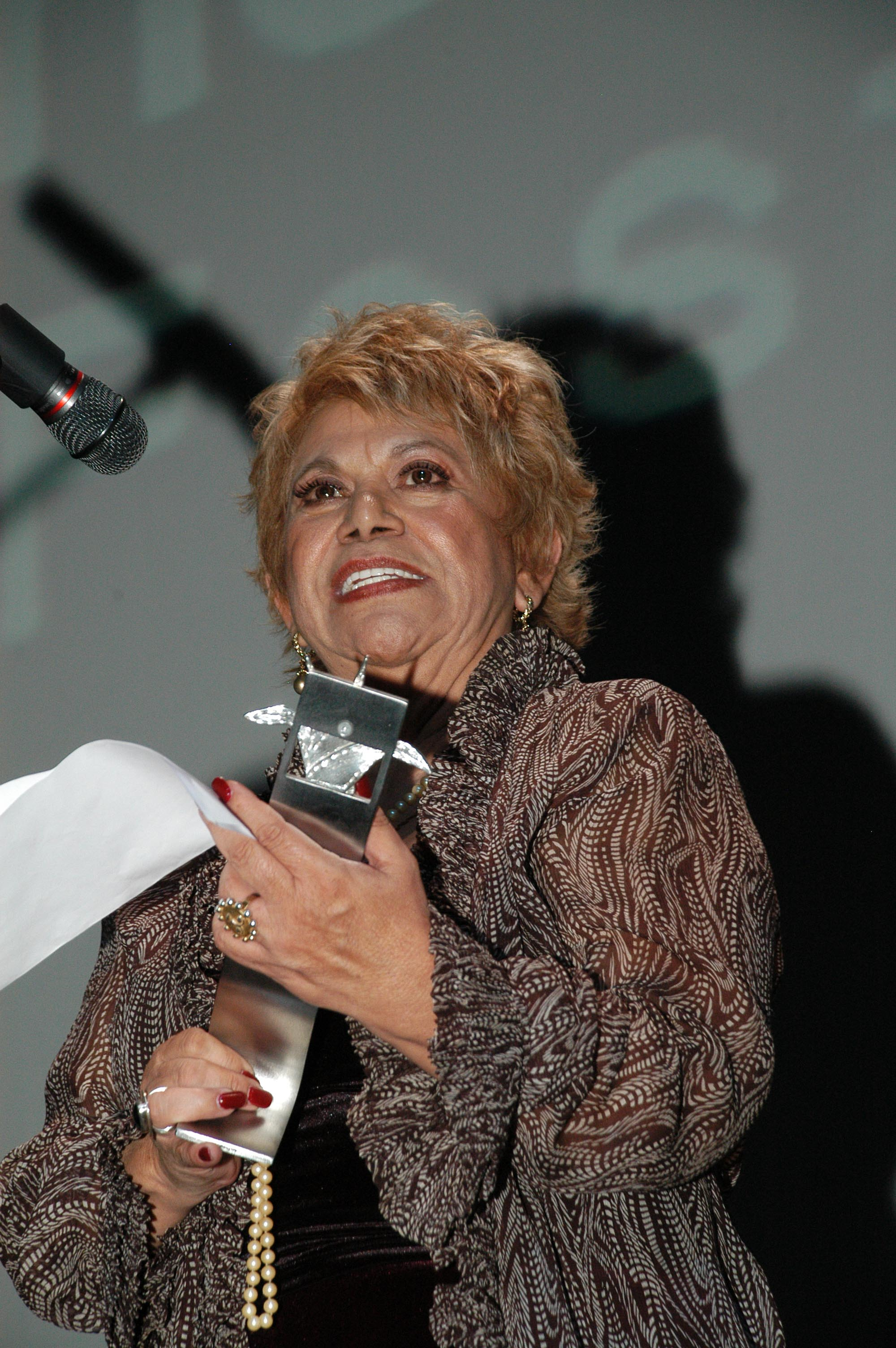 Guadalajara, Jalisco, 11 de marzo de 2008. Lupe Ontiveros entregó los Mayahueles al Cine Argentino.